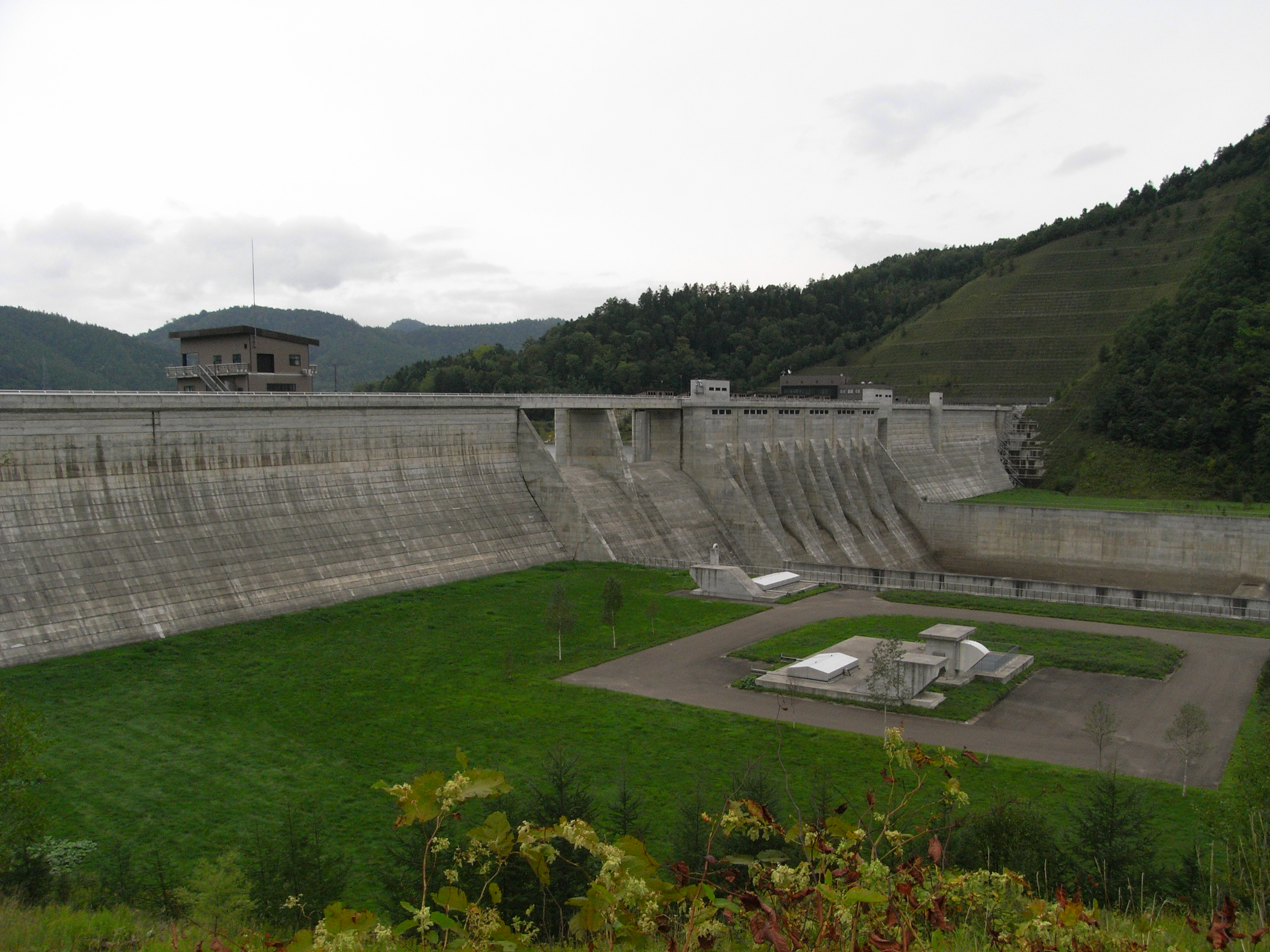 Dam